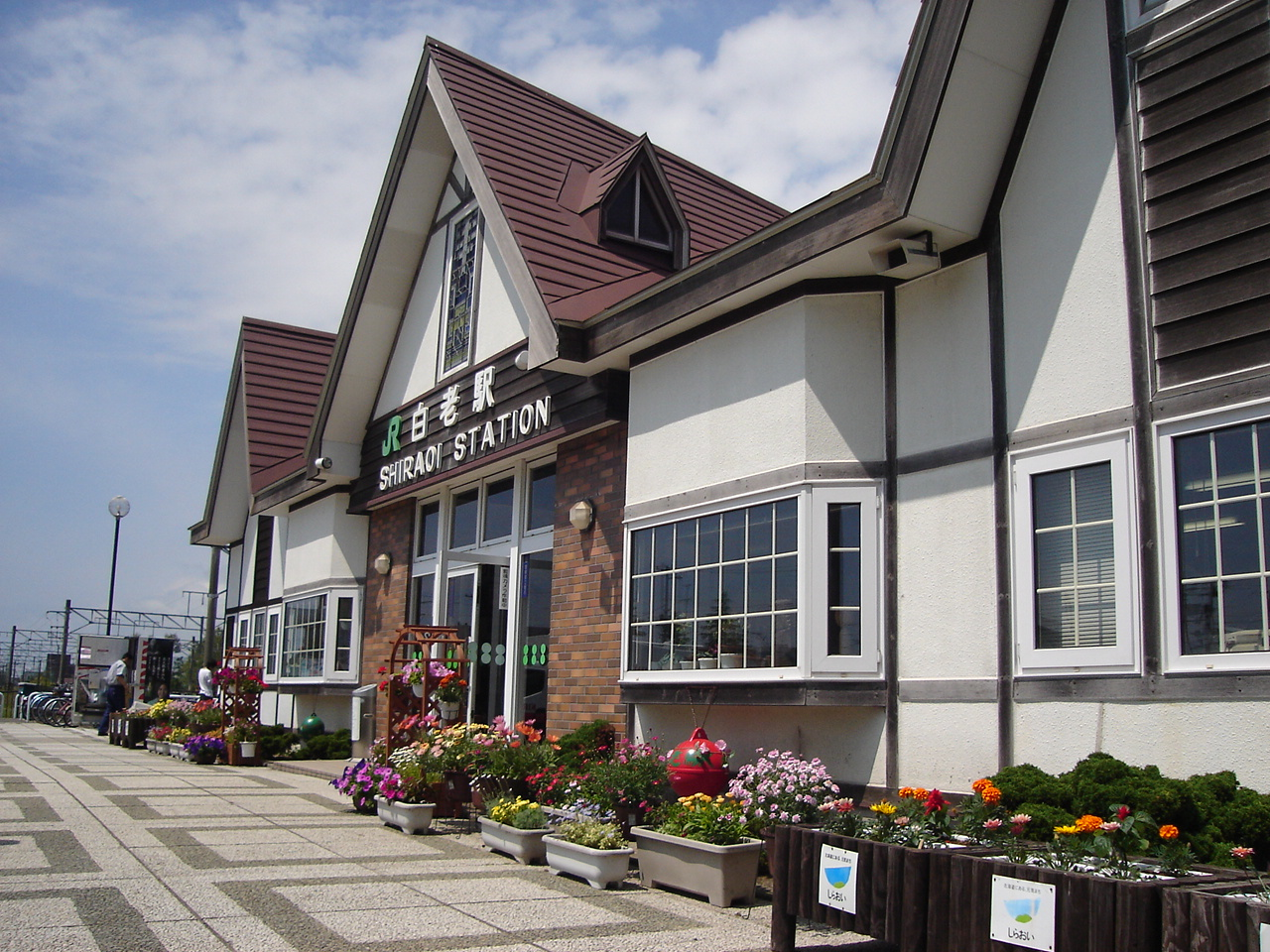 Shiraoi Station, JR Hokkaido